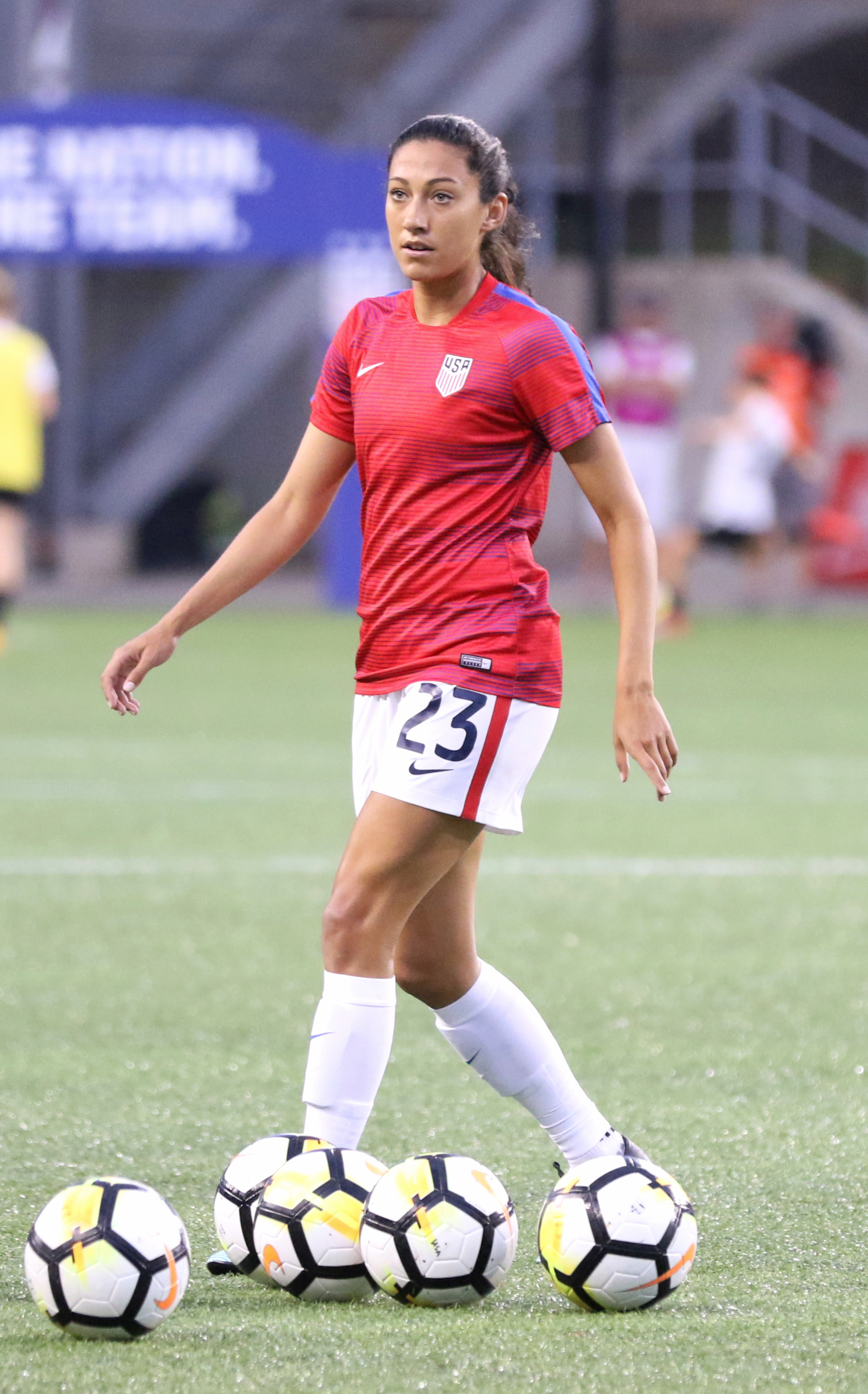 ChristenPress